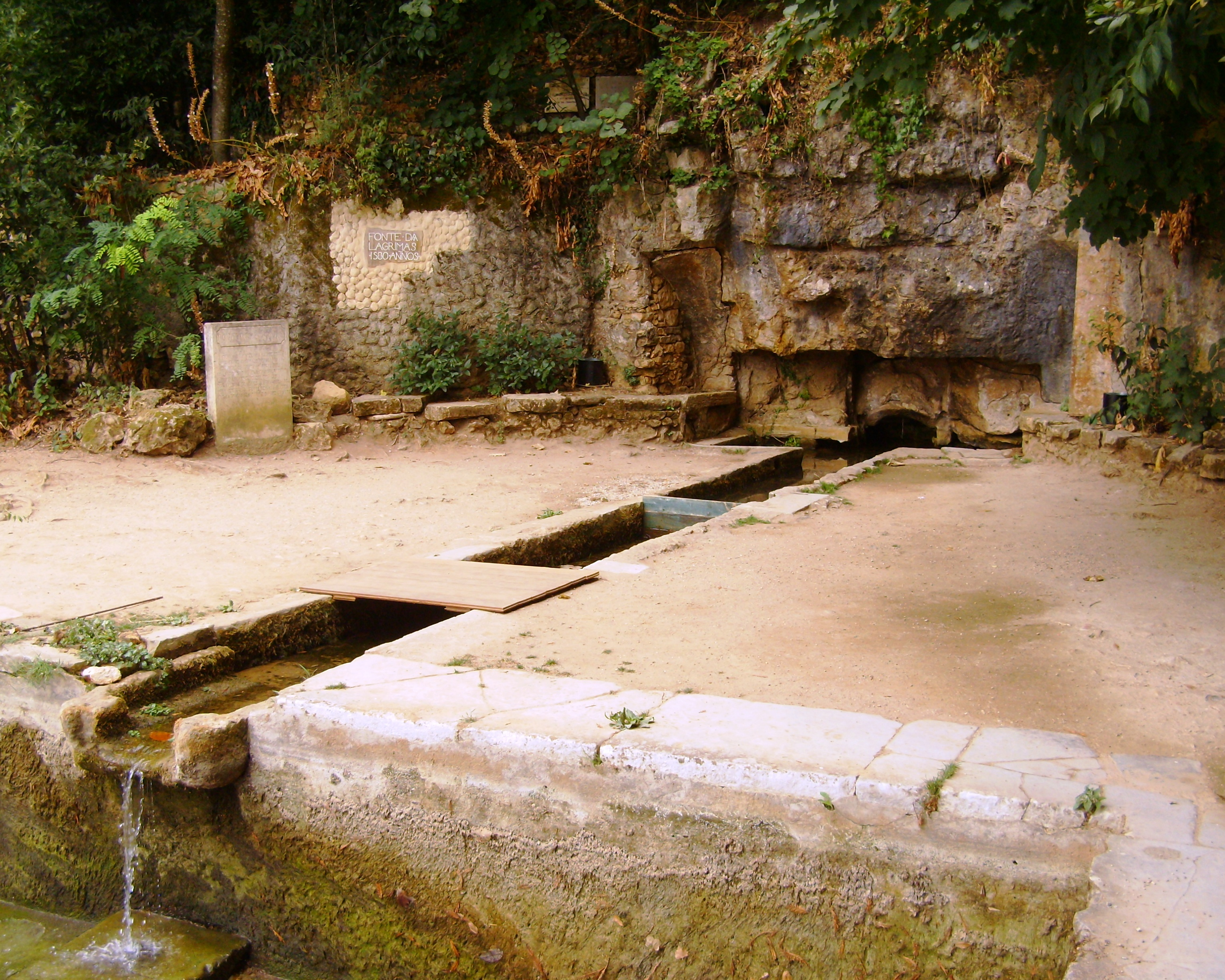 Quinta das Lágrimas, freguesia de Santa Clara, cocelho e distrito de Coimbra, Portugal: "Fonte das Lágrimas".